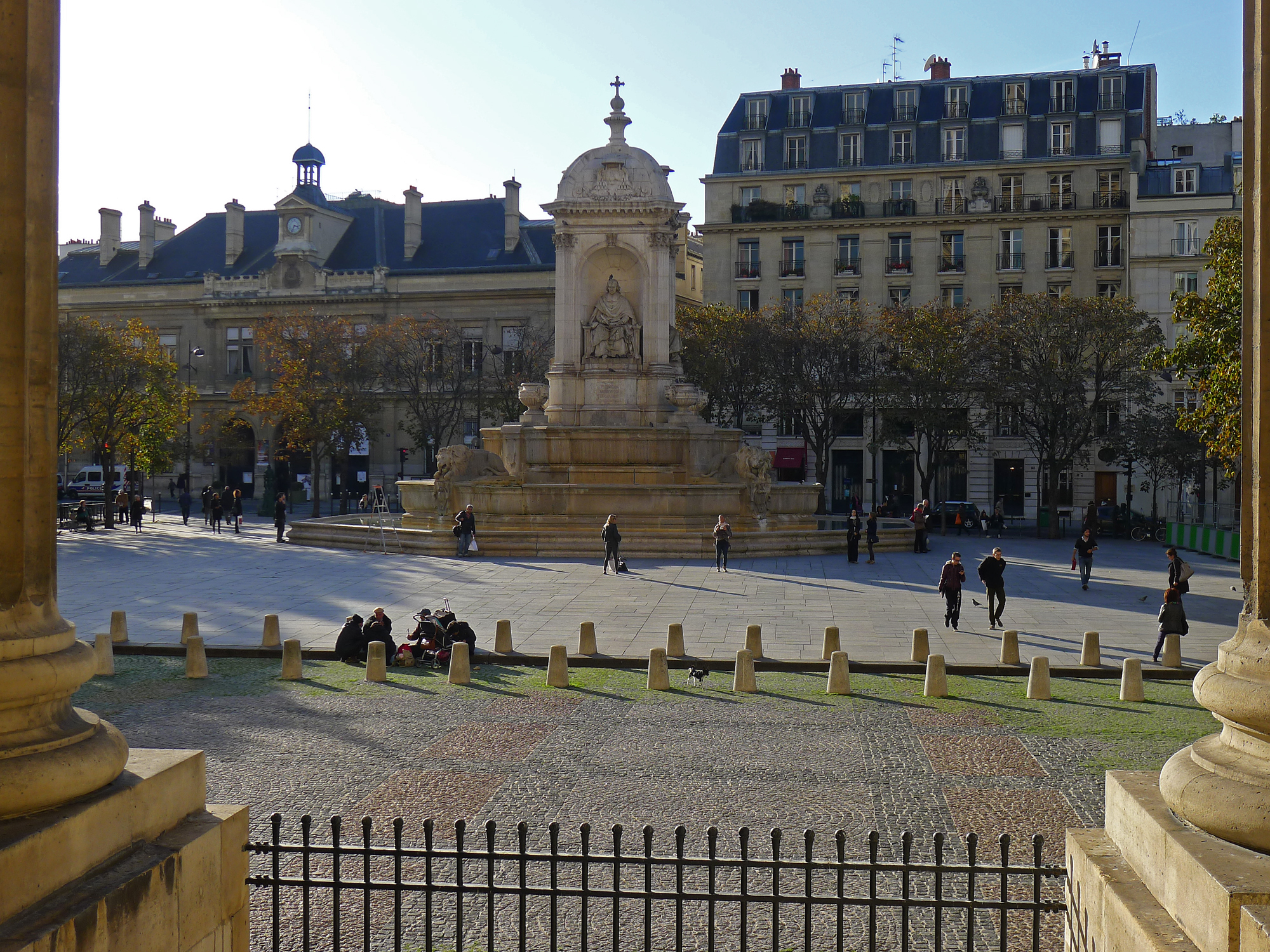 Place et fontaine Saint-Sulpice - Paris VI .